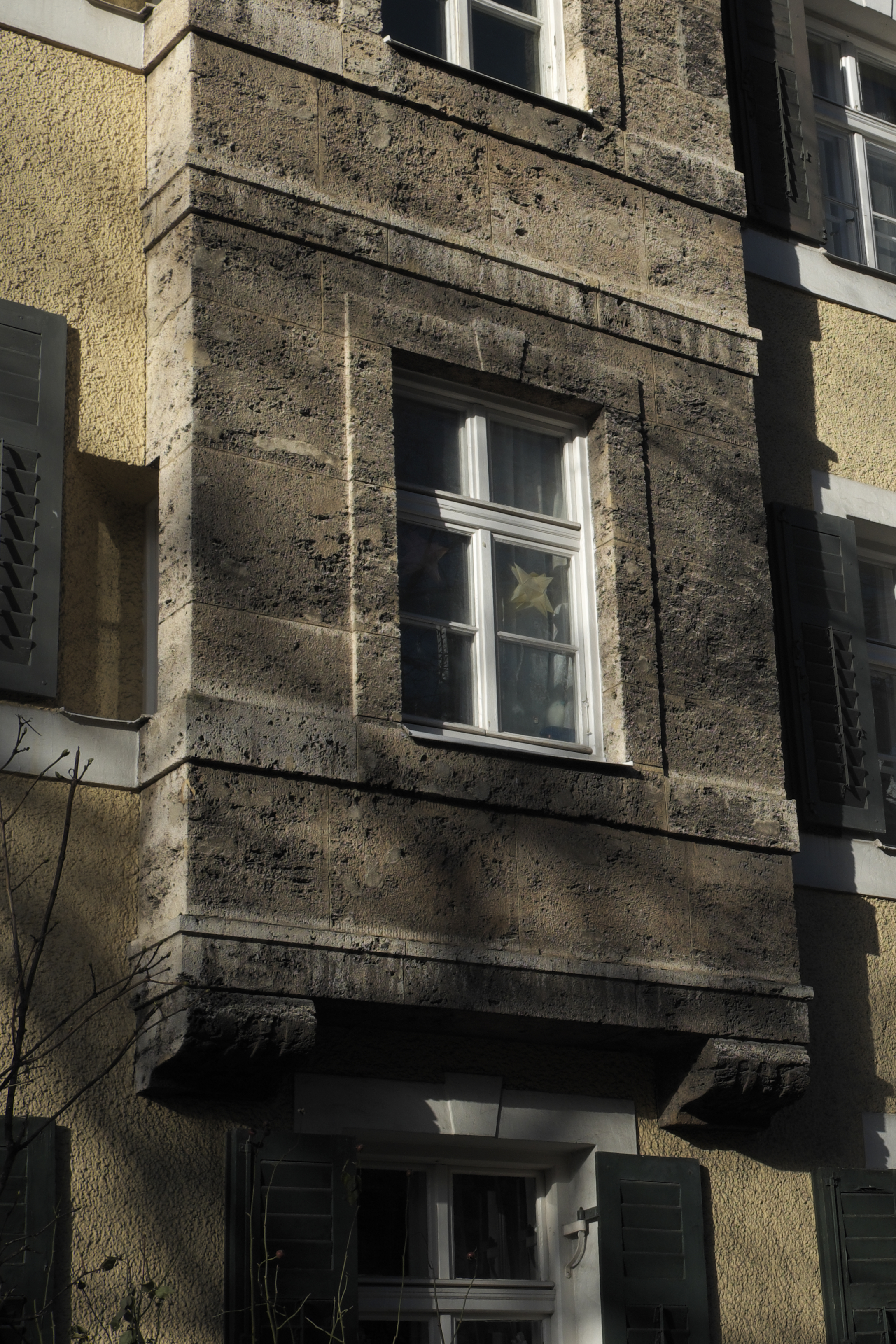 Mietshaus in der Heimeranstraße 4 im Stadtbezirk Schwanthalerhöhe in München (Bayern/Deutschland), 1911/12 von Hans Grässel erbaut